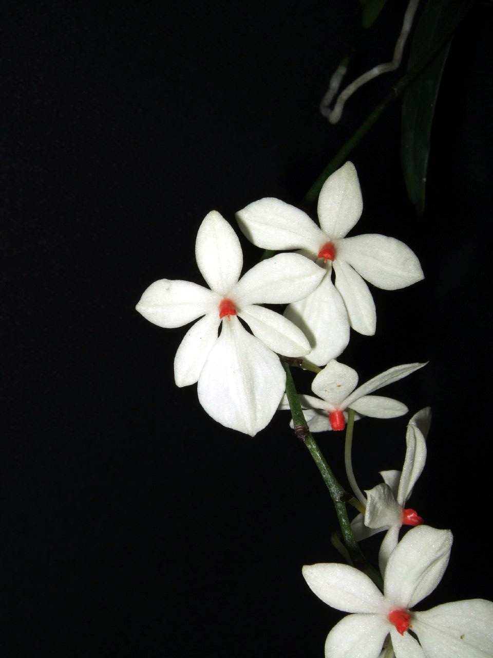 Aerangis luteoalba var. rhodosticta